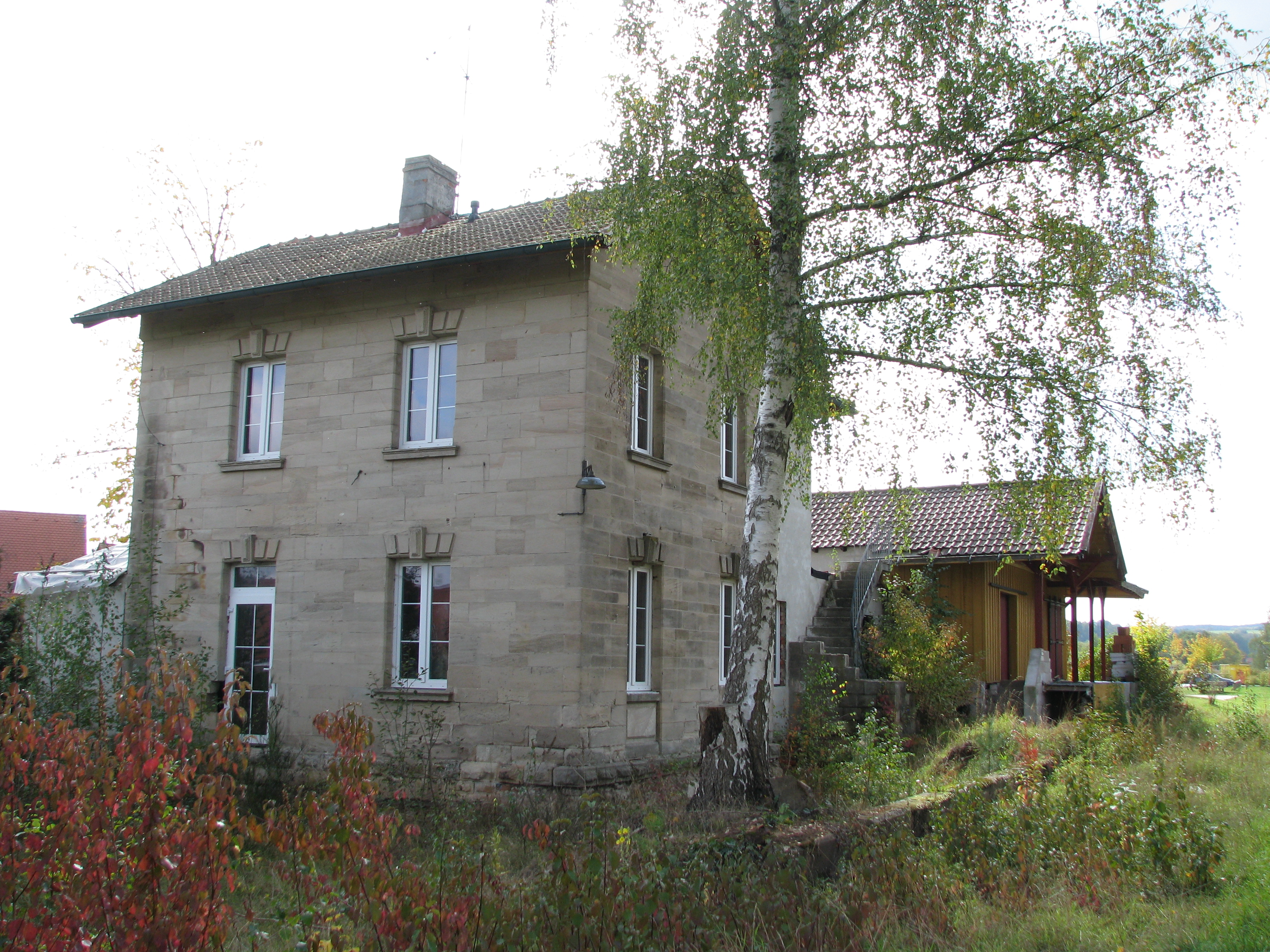 Bahnhof Heideck-Seiboldsmühle im mittelfränkischen Landkreis Roth